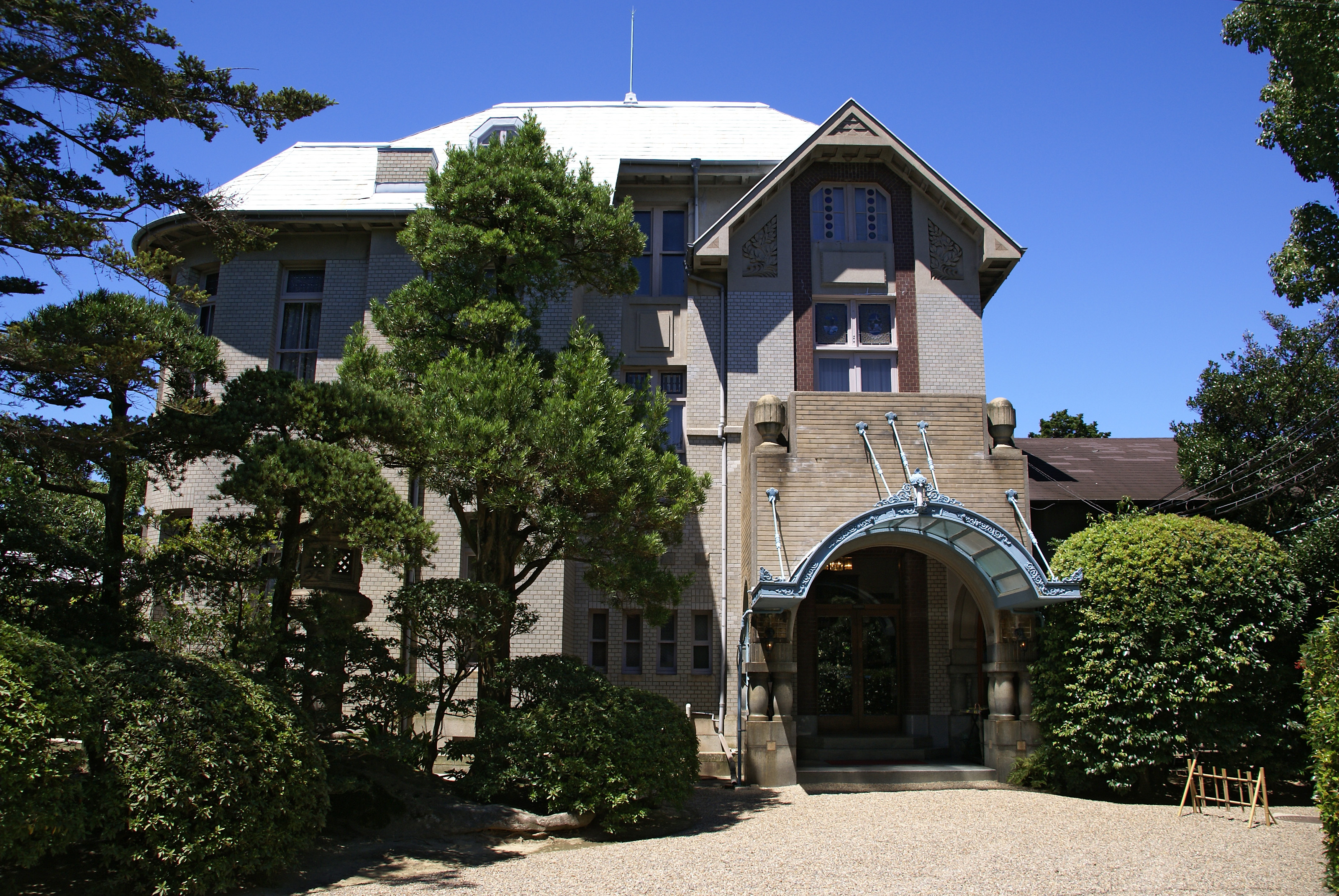 Maiko Hotel in Kobe, Hyogo prefecture, Japan